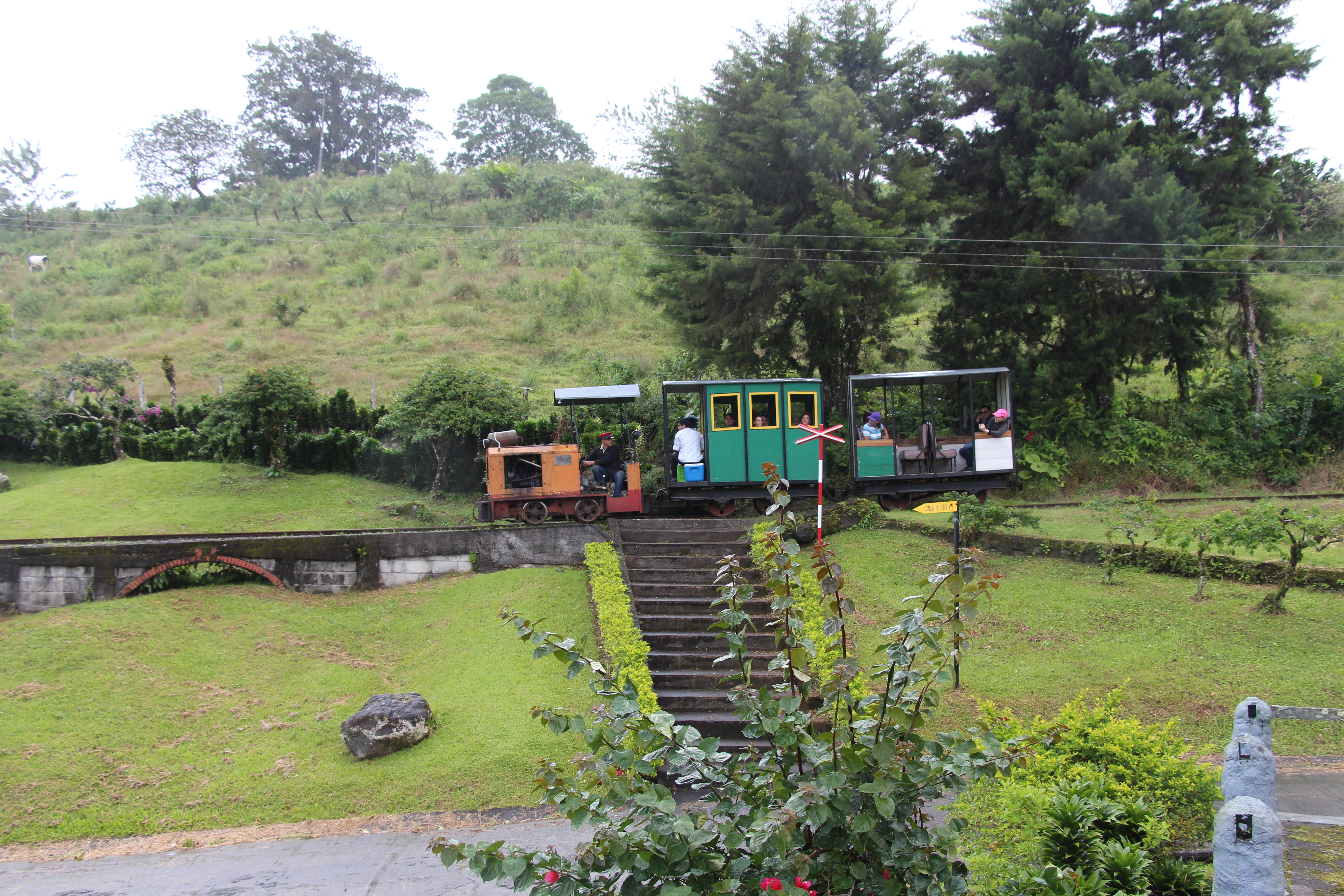 Eine Komposition auf dem Rückweg zur Talstation auf Höhe der Kapelle